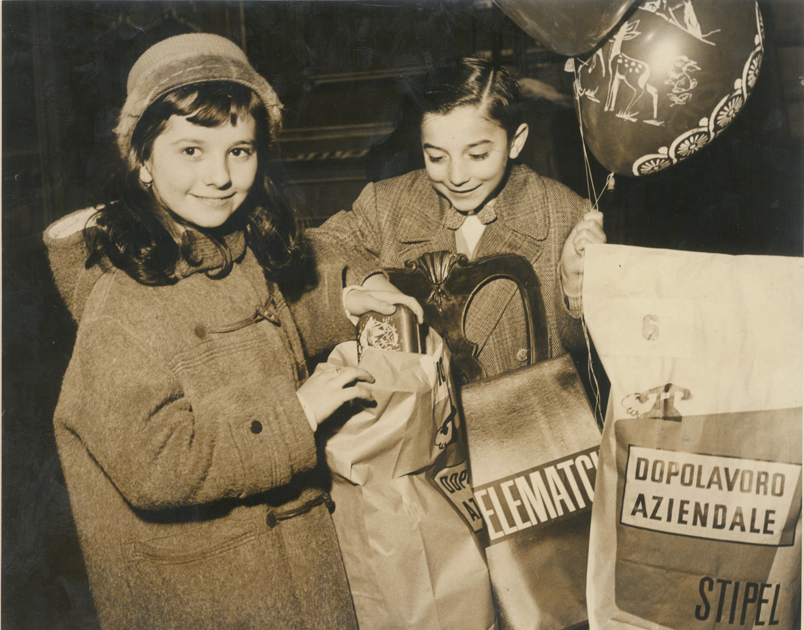 Distribuzione dei pacchi dono della Befana ai figli di dipendenti presso il Dopolavoro aziendale STIPEL, anni ‘60. Foto Archivio Storico TIM